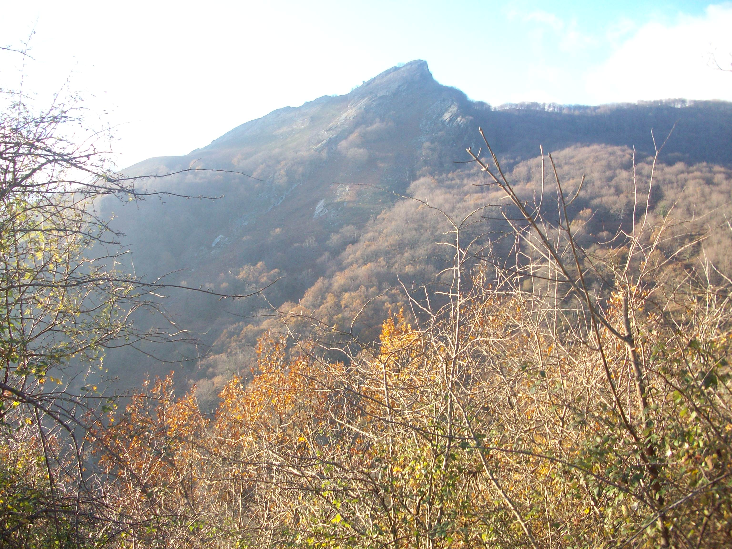 Nafarroako Zubieta udalerrian dagoen Makilipurdi mendia (Euskal Herria).